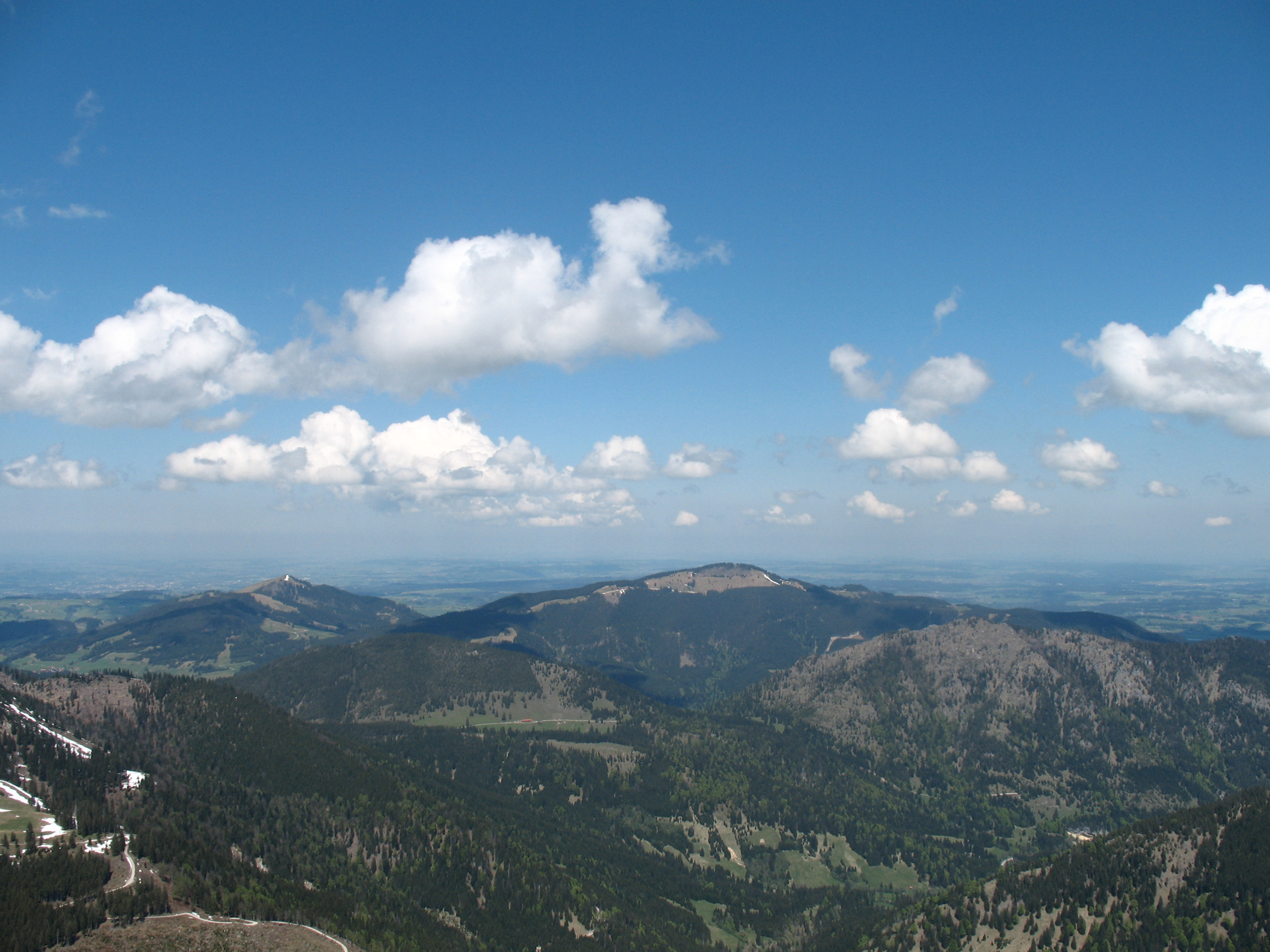 Blick vom Einstein nach Norden auf Westerkienberg (1488 m) und Kienberg (1536 m). Dahiner Reuterwanne (1542 m) und Edelsberg (1630 m).